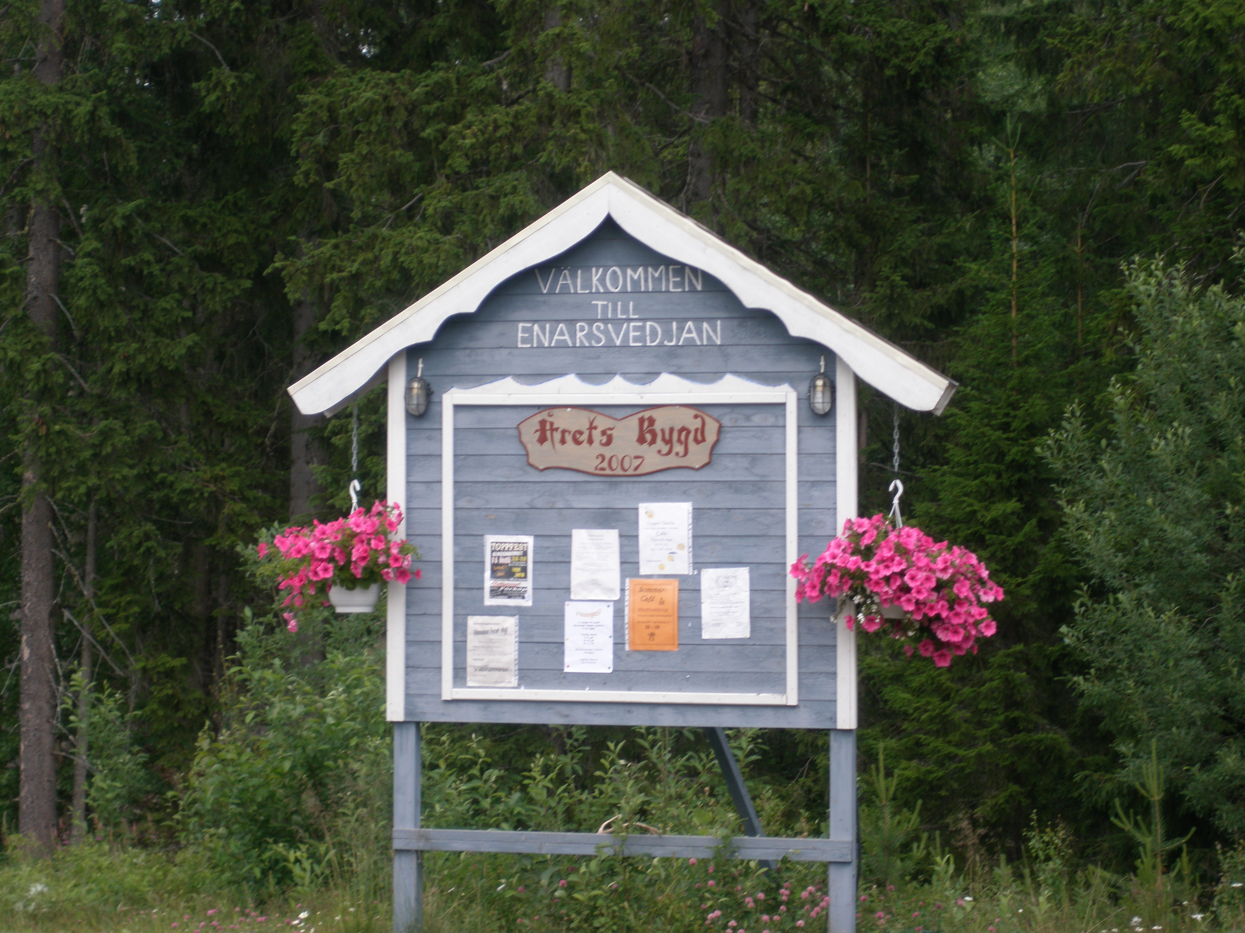 Enarsvedjan, Offerdals socken, Krokoms kommun, Jämtland, Sverige.